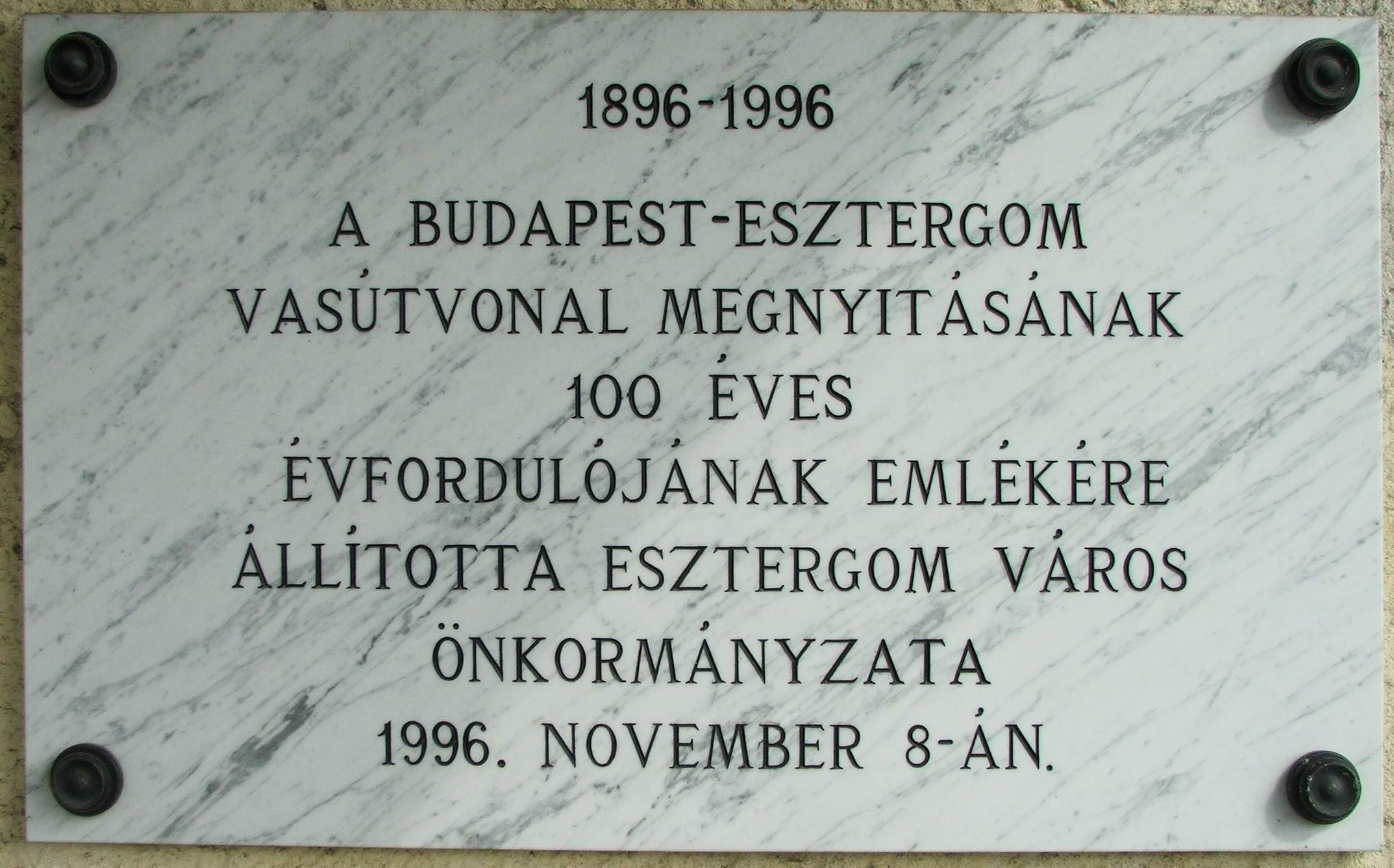 Az Esztergom-Budapest vonal emléktáblája